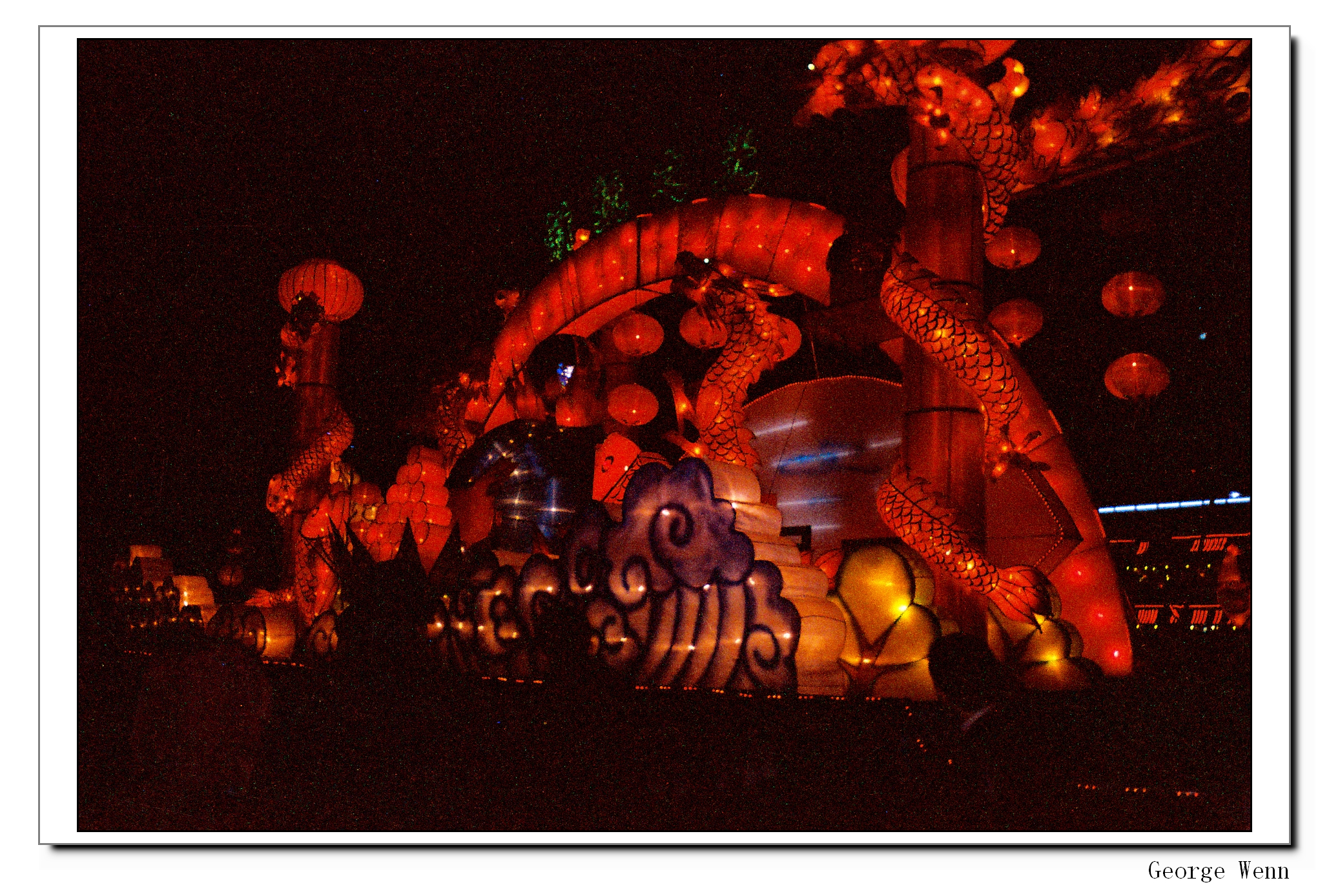 2005年元宵节